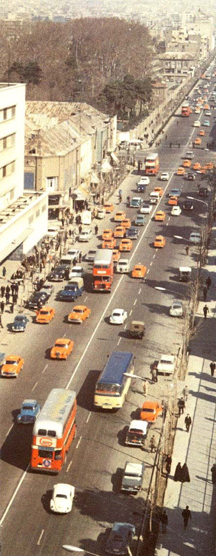 خیابان فردوسی، نیمه دهه ۱۳۴۰ خورشیدی (دهه ۱۹۶۰ میلادی)